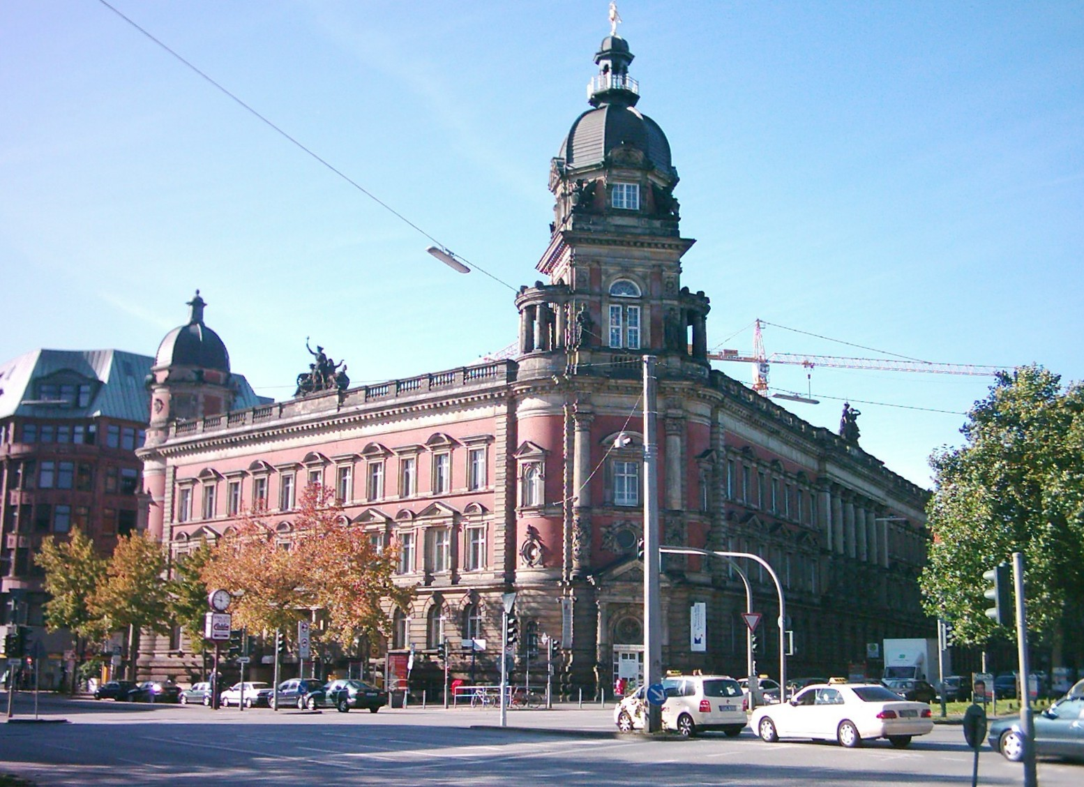 Die 1883 bis 1887 erbaute ehemalige Oberpostdirektion am Stephansplatz, Dammtorstraße Ecke Gorch-Fock-Wall, Hamburg.